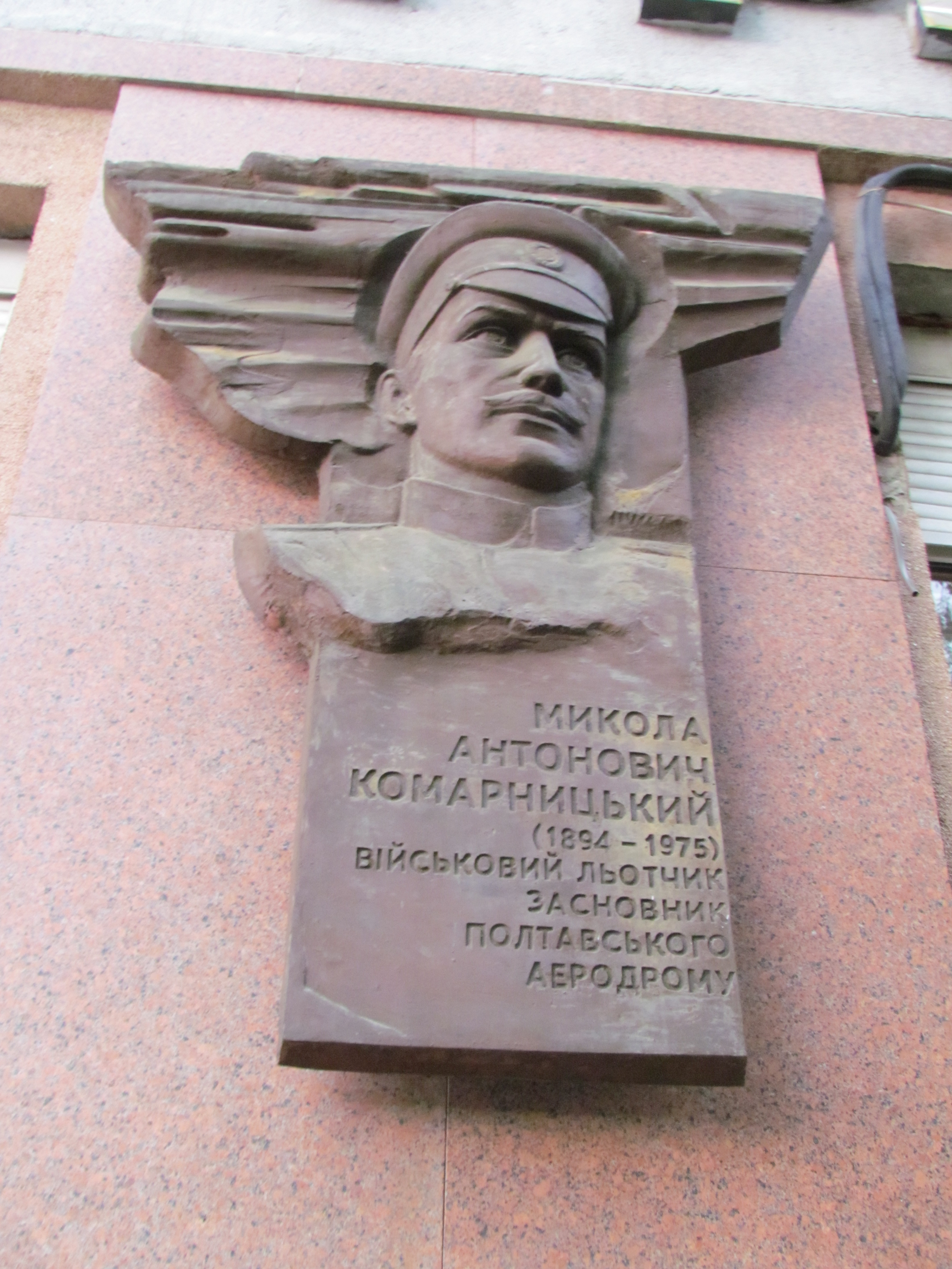 Меморіальна дошка в пам’ять військового льотчика, засновника Полтавського аеродрому, родоначальника сільськогосподарської авіації М.А.Комарницького (1894–1975).